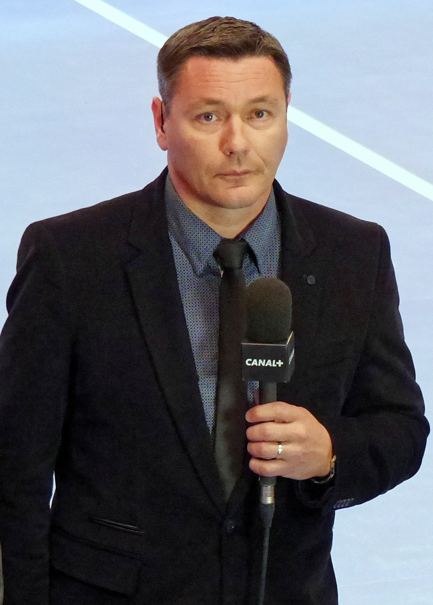 Grégory Anquetil, ancien handballeur pro et consultant pour la chaine Canal Plus, le 10 avril 2014 lors du match Psg Handball/HBC Nantes.